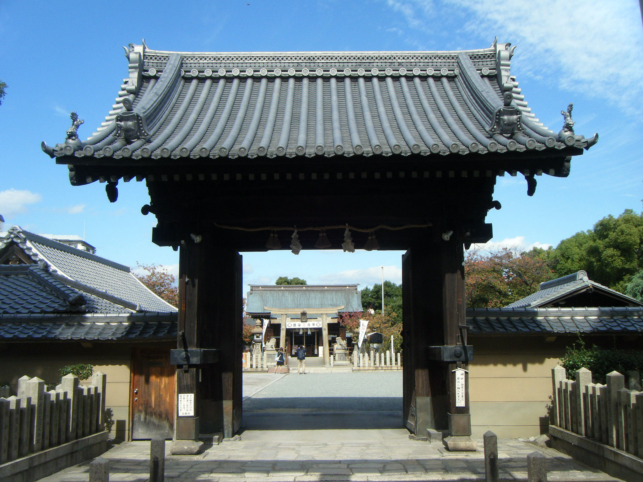 尼崎・貴布禰神社 表門正面